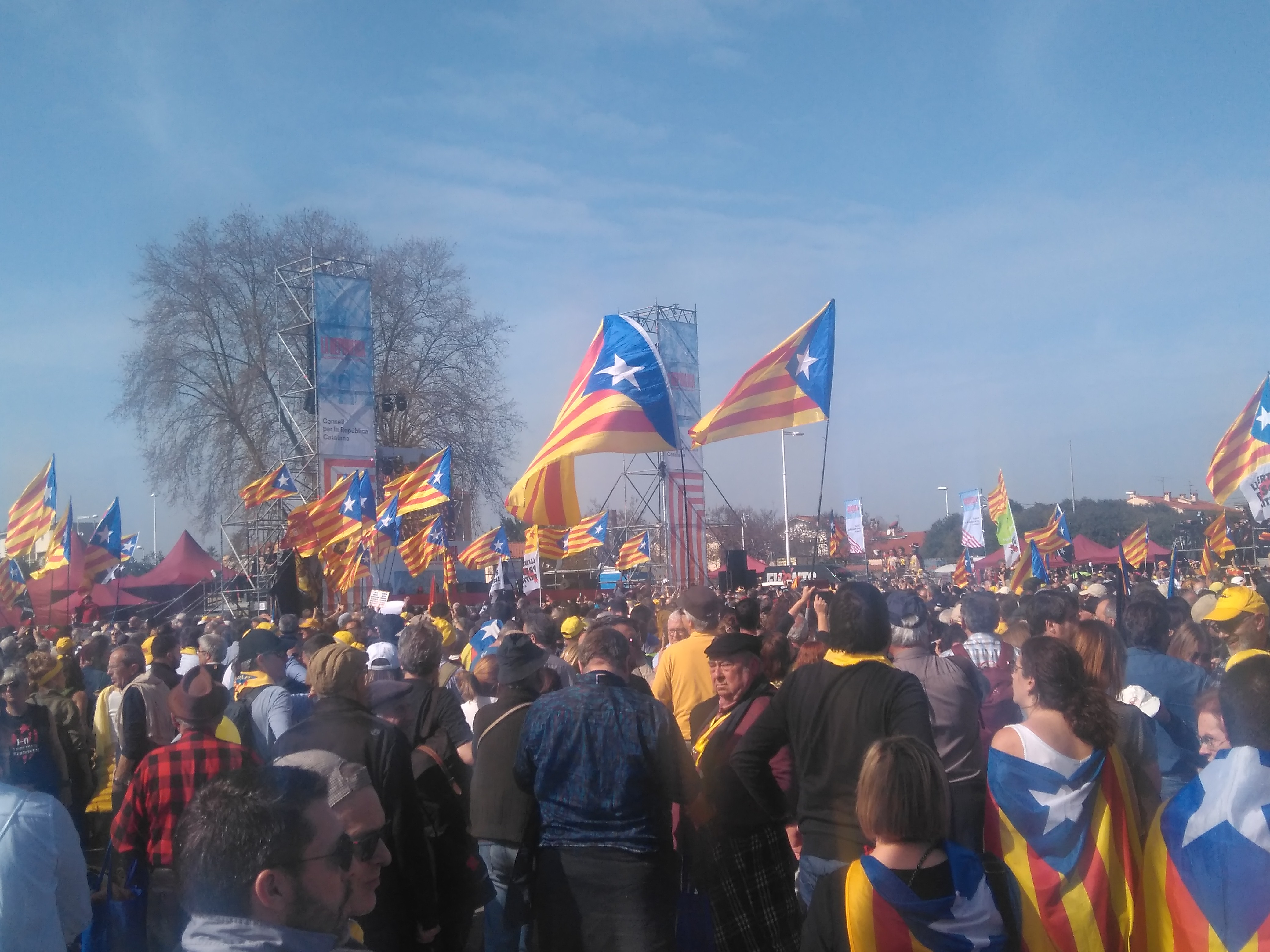 La República al centre (del món), acte a Perpinyà amb la presidència de l'expresident de la Generalitat de Catalunya Carles Puigdemont, Toni Comín i Clara Ponsatí, tots tres eurodiputats i exiliats.